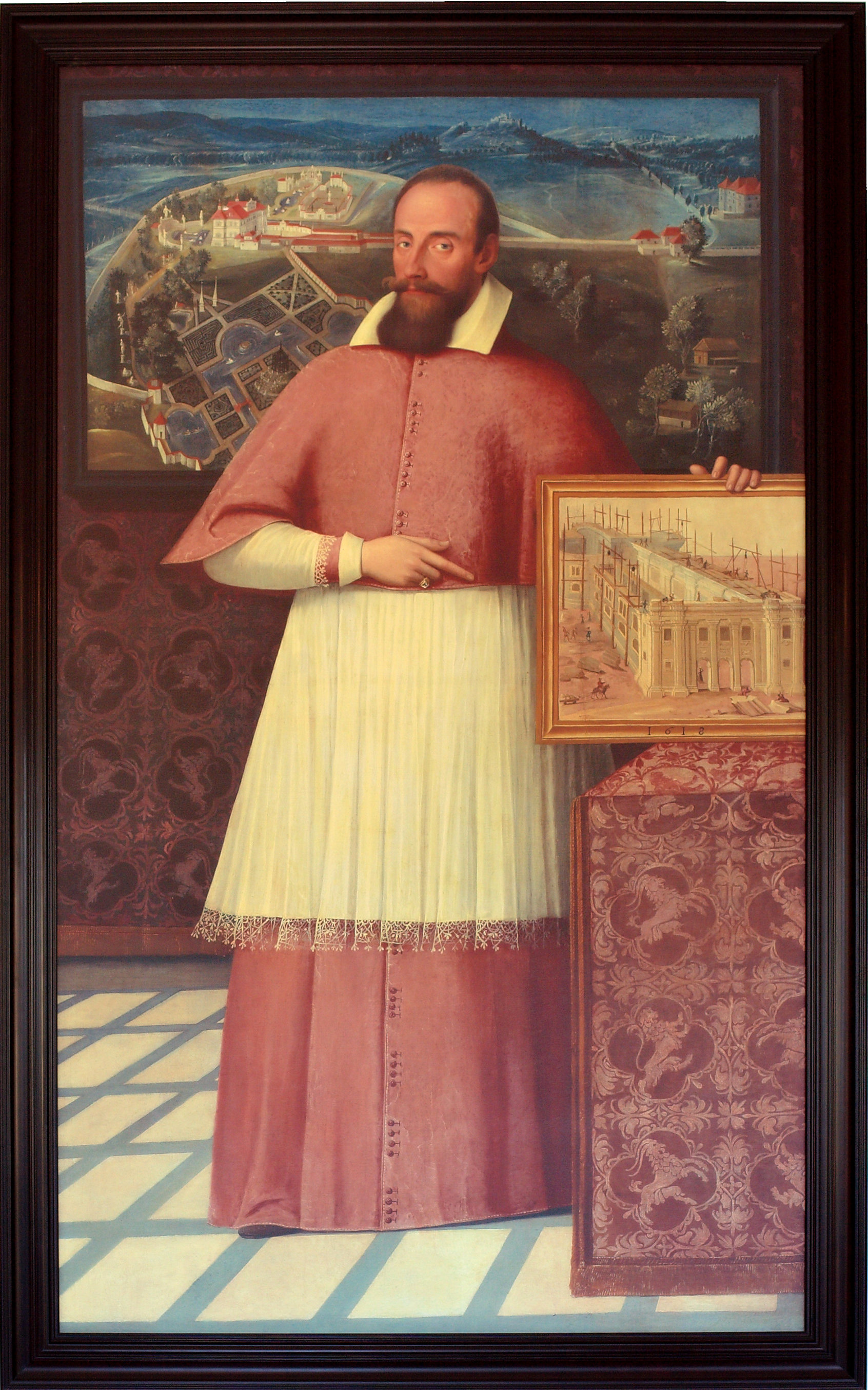 Markus Sittikus, Erbauer des Schlosses Hellbrunn